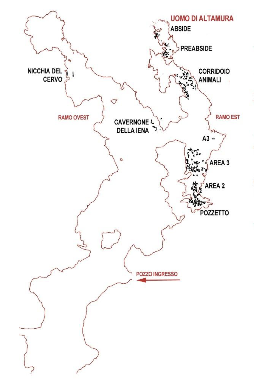 Planimetria della grotta di Lamalunga dove sono stati rinvenuti vari resti faunistici e il più noto Uomo di Altamura. Nella planimetria sono evidenziati alcuni nomi Topografici e la distribuzione parziale dei resti faunistici.